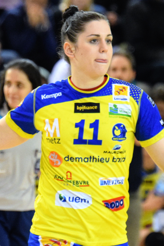 Tamara Horacek , le 31 janvier 2016 lors du match Issy Paris Hand / Metz Handball pour le compte de la 14e journée. Au stade Robert Carpentier à Issy-les-moulineaux.